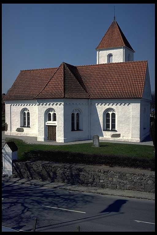 Kyrkan från söder. Runstenar finns inmurade i kyrkofasaden. Motiv: Hällestads kyrka Kategori: (01) ExteriörerKyrkan från söder. Runstenar finns inmurade i kyrkofasaden.